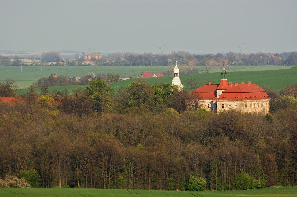 Dolina Bystrzycy w okolicy Domanic.